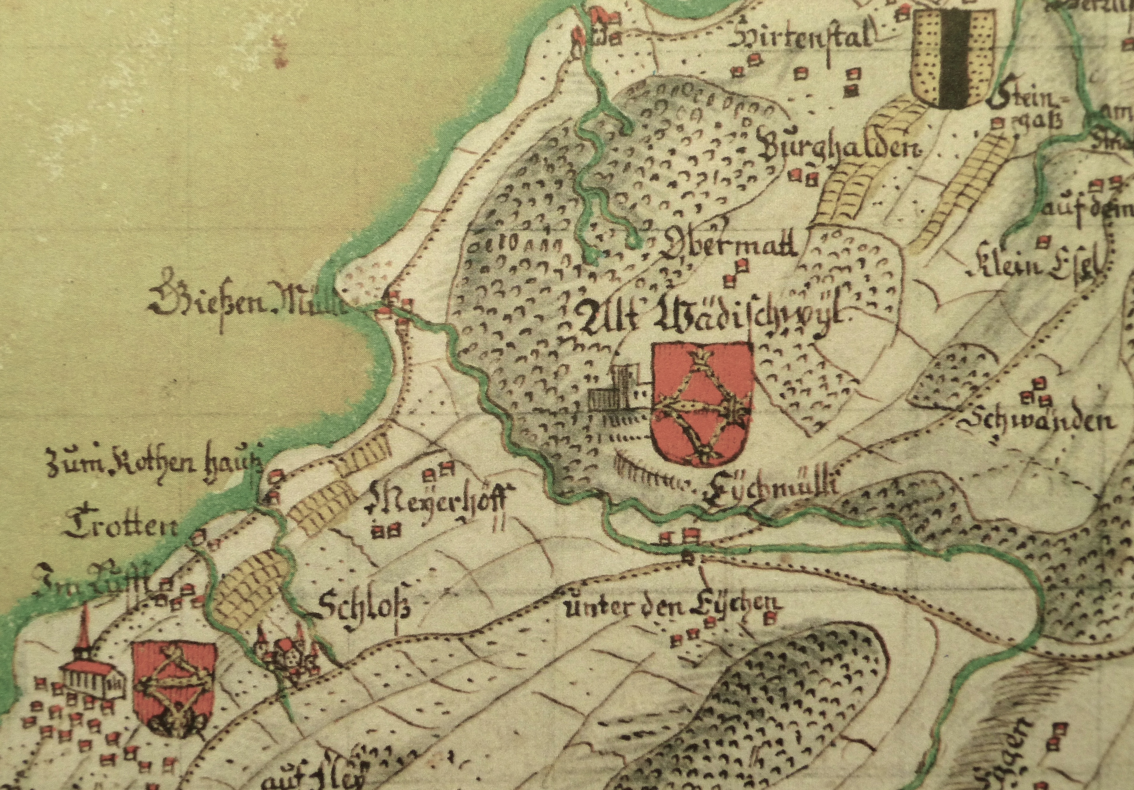 Hans Conrad Gyger: Wädenswil auf der «Karte des Kantons Zürich aus dem Jahr 1667 in 56 Blättern von Hans Conrad Gyger».